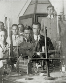 Germán Bernécer Tormo en el laboratorio de física de Alicante